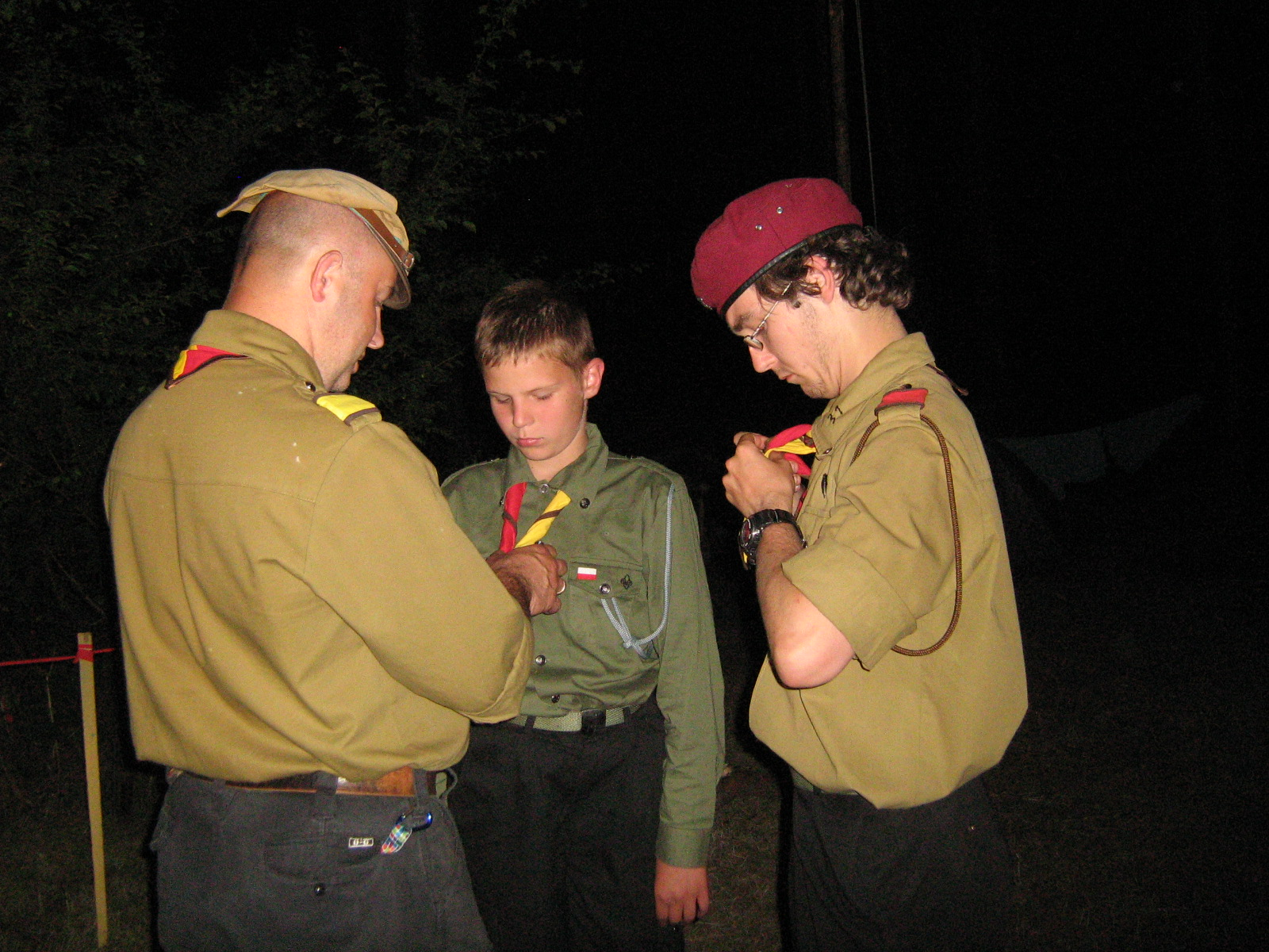 Ilustracja przedstawia harcerski obrzęd nadawania barw drużyny, tzw. chustowania. Podczas gdy drużynowy (z lewej) upina chustę na mundurze chustowanego, jego zastępowy (z prawej) zdejmuje własne kółko do chusty, by za chwilę wręczyć je biszkoptowi.